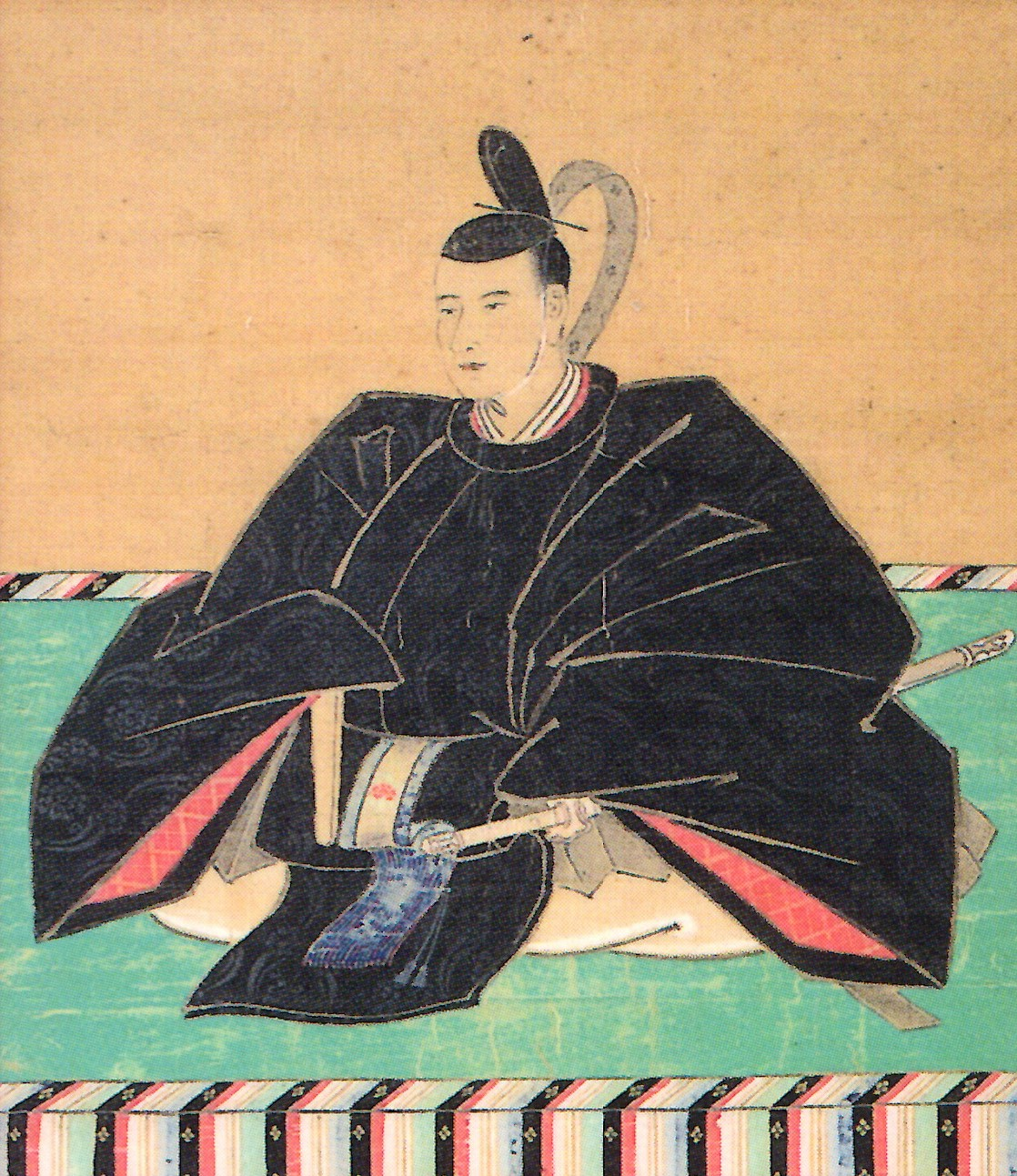 毛利重就の肖像。